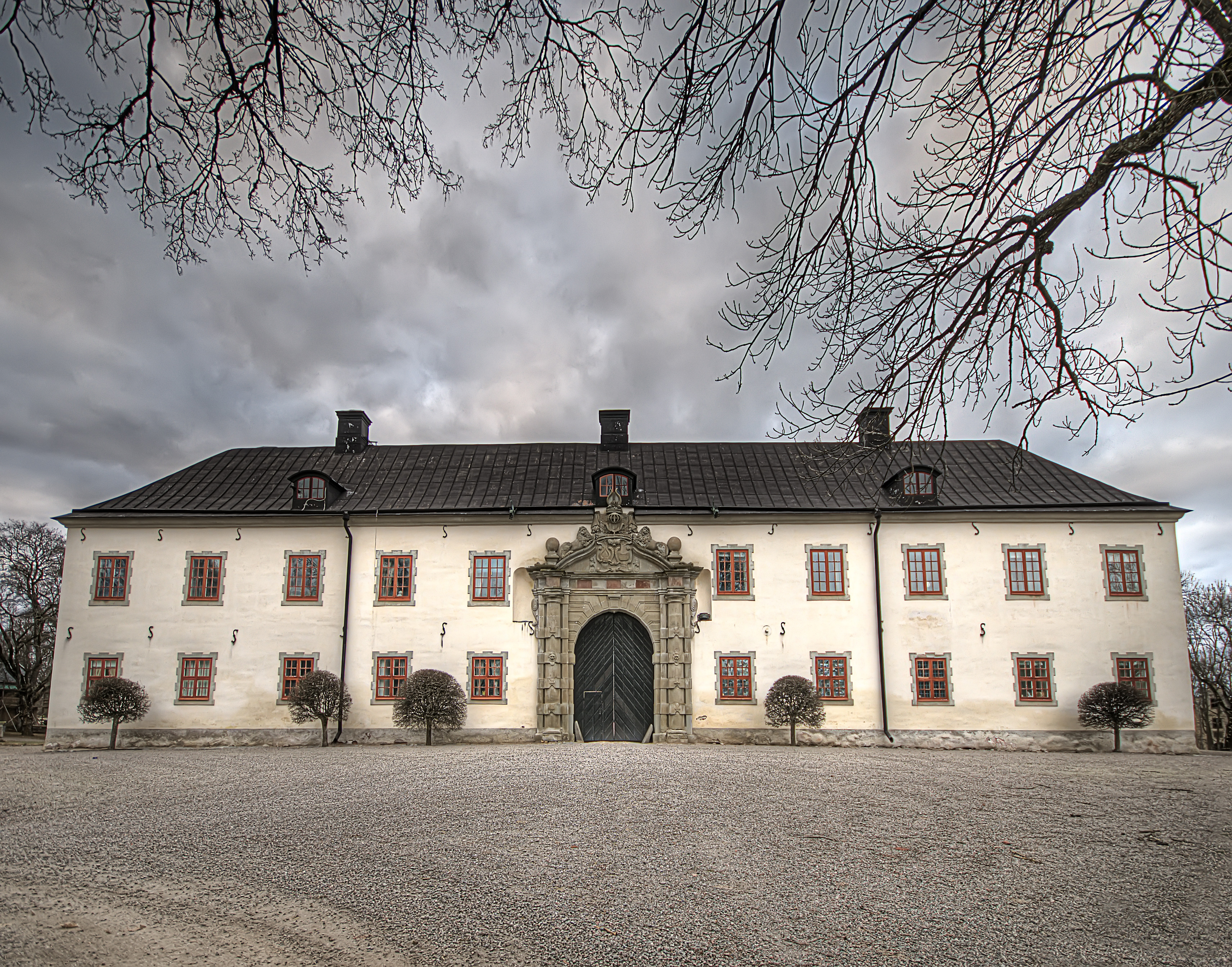 Tidö slott, Västmanland.